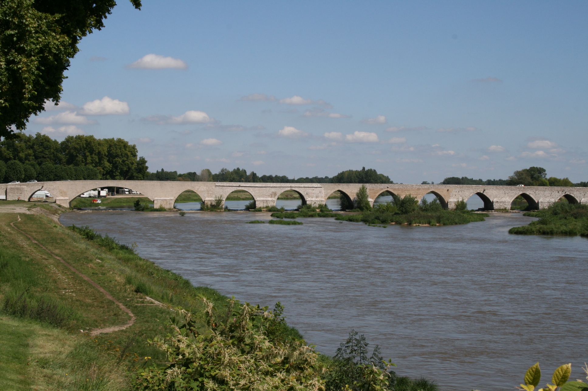 Pont de Beaugency (Loiret - France) – vue des arches en rive droite.